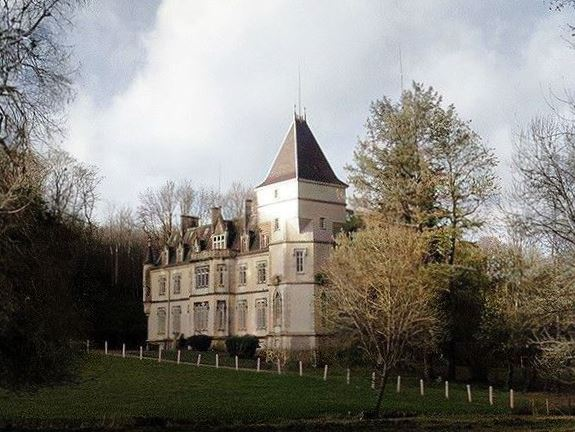 Château de Domecy-sur-le-Vault